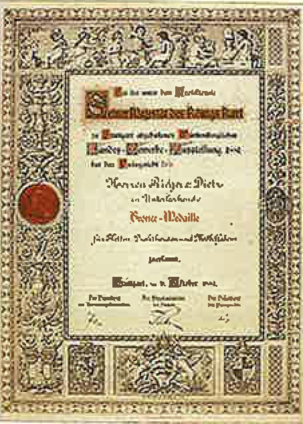 1880 erhält RUD per Ehrenurkunde die "königliche Anerkennung" für die ihre von höchster Qualität gefertigten Kettenerzeugnisse